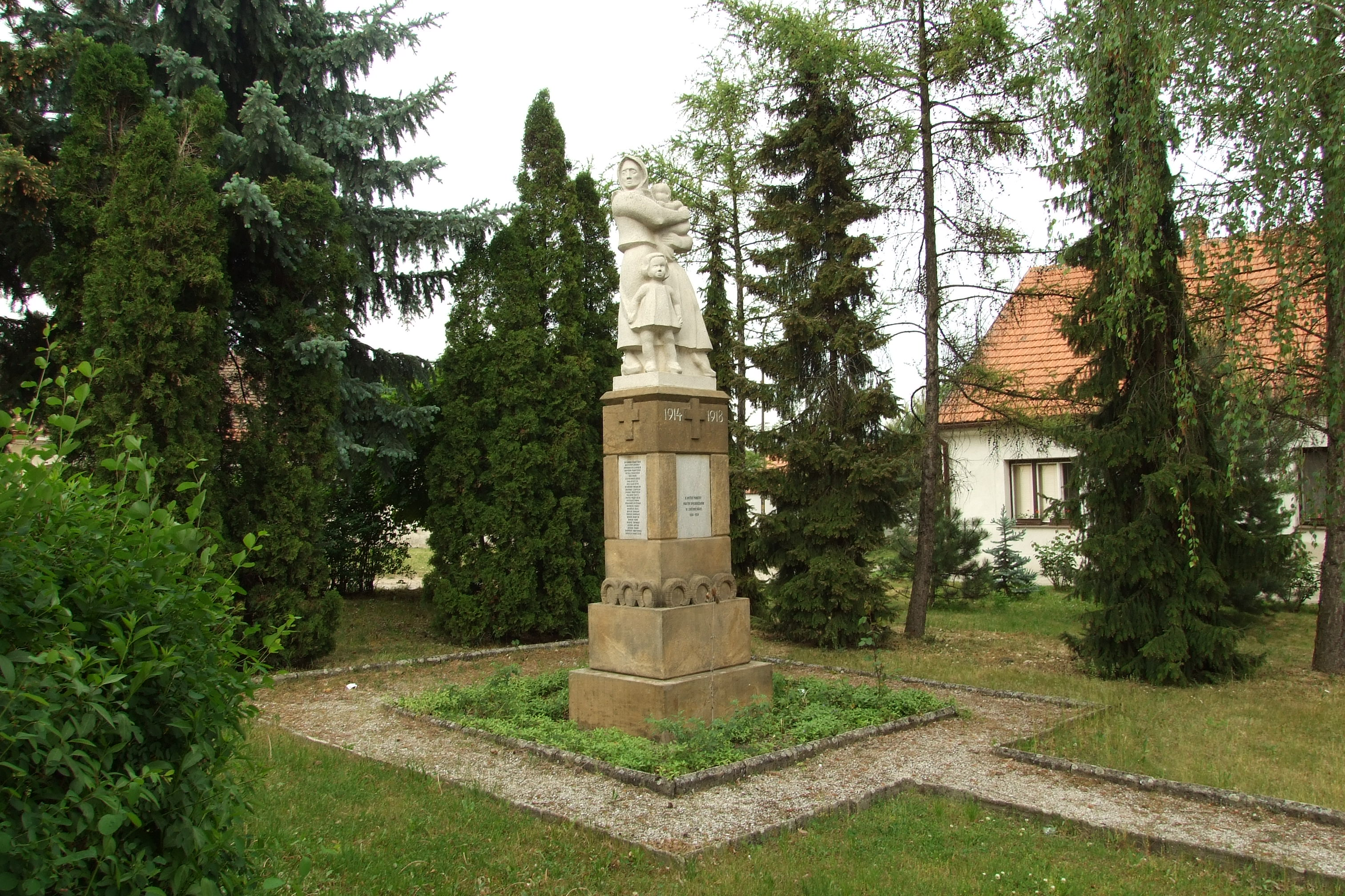 Brněnské Ivanovice - pomník obětem 1. světové války na Ivanovickém náměstí (František Fabiánek, 1923)